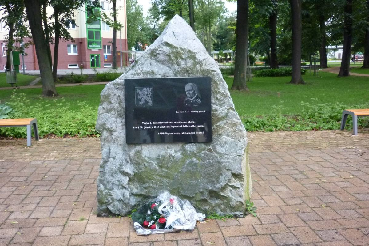 Poprad - Slovensko